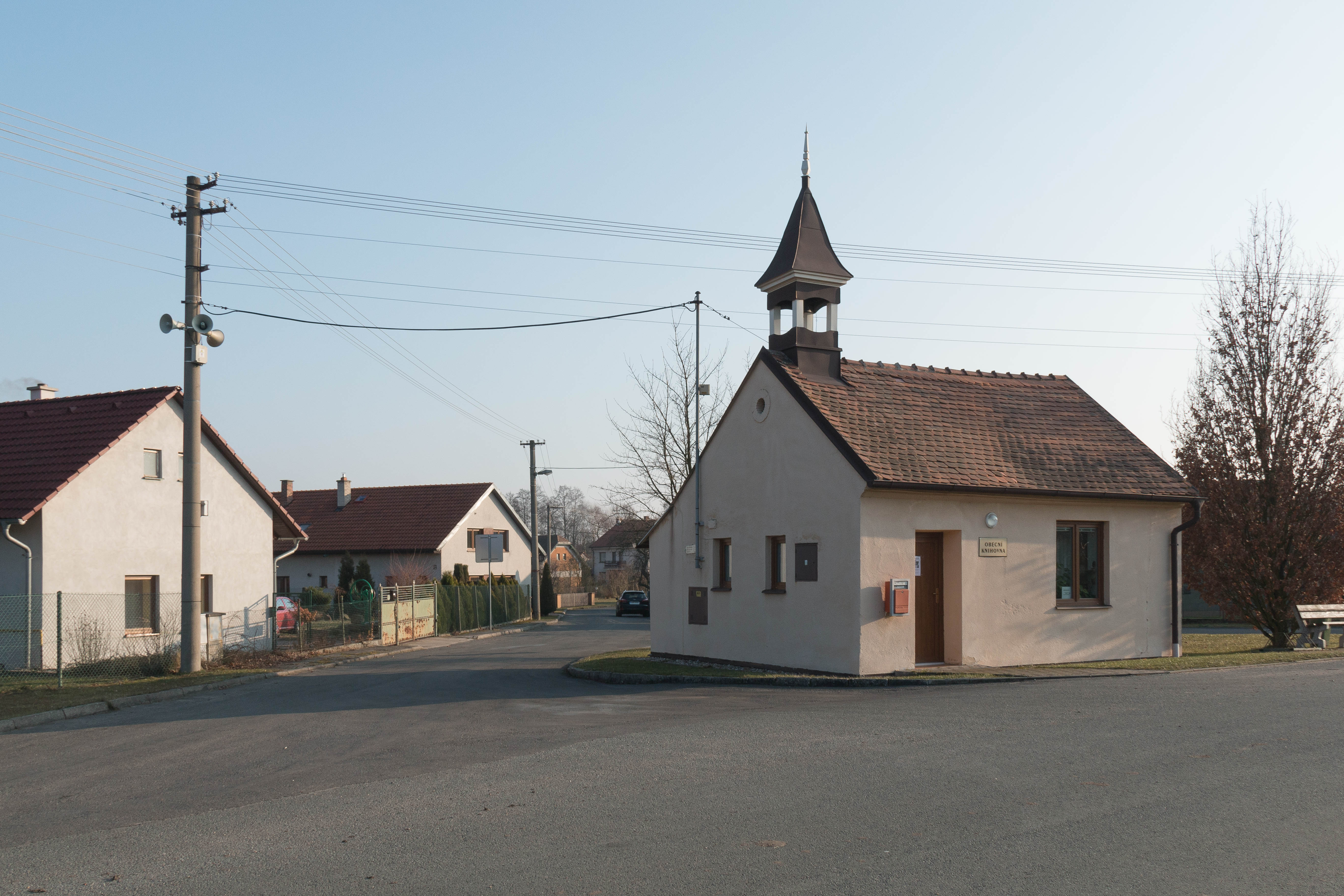 Přelovice knihovna